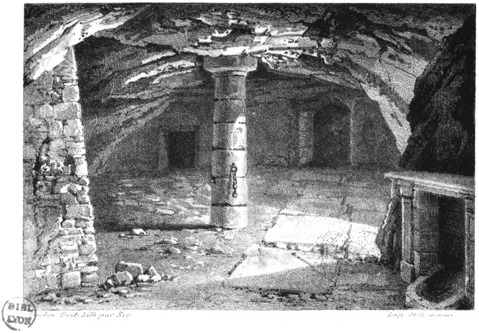 Illustration du livre Histoire de l'hospice de l'Antiquaille de Lyon, de Jean-Marie Achard-James (1834).